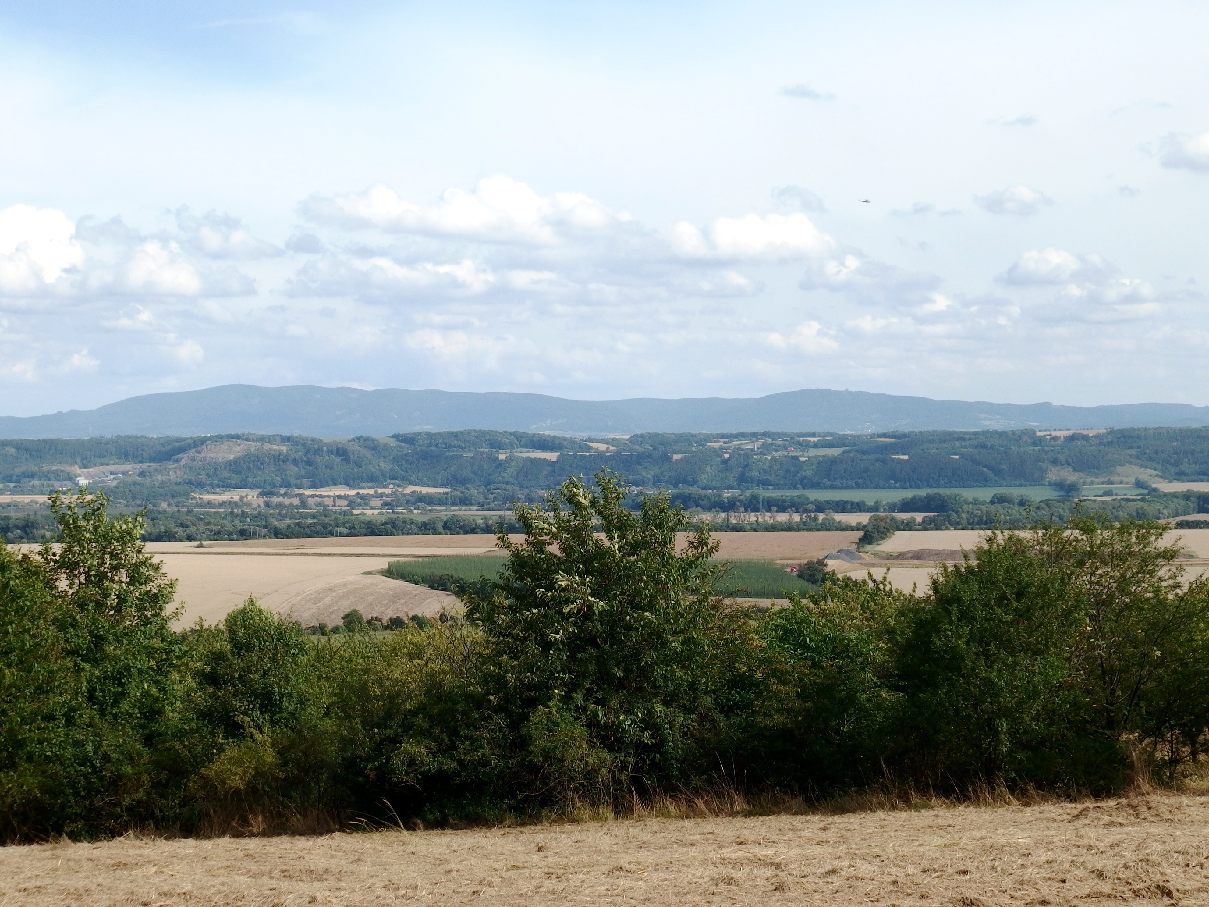 Moravská brána a Hostýnské vrchy, výhled nad obcí Veselíčko, okres Přerov.